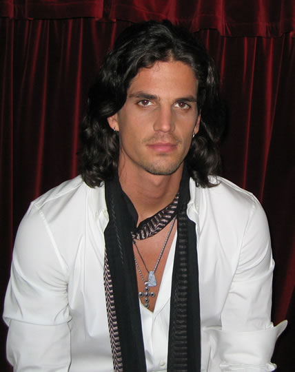 Tommy Reeve im deutschen Schauspielhaus, Hamburg